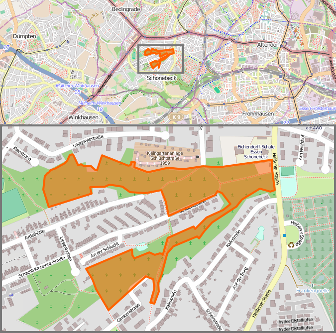 Naturschutzgebiet Schönebecker Schlucht (E-002) – Karte